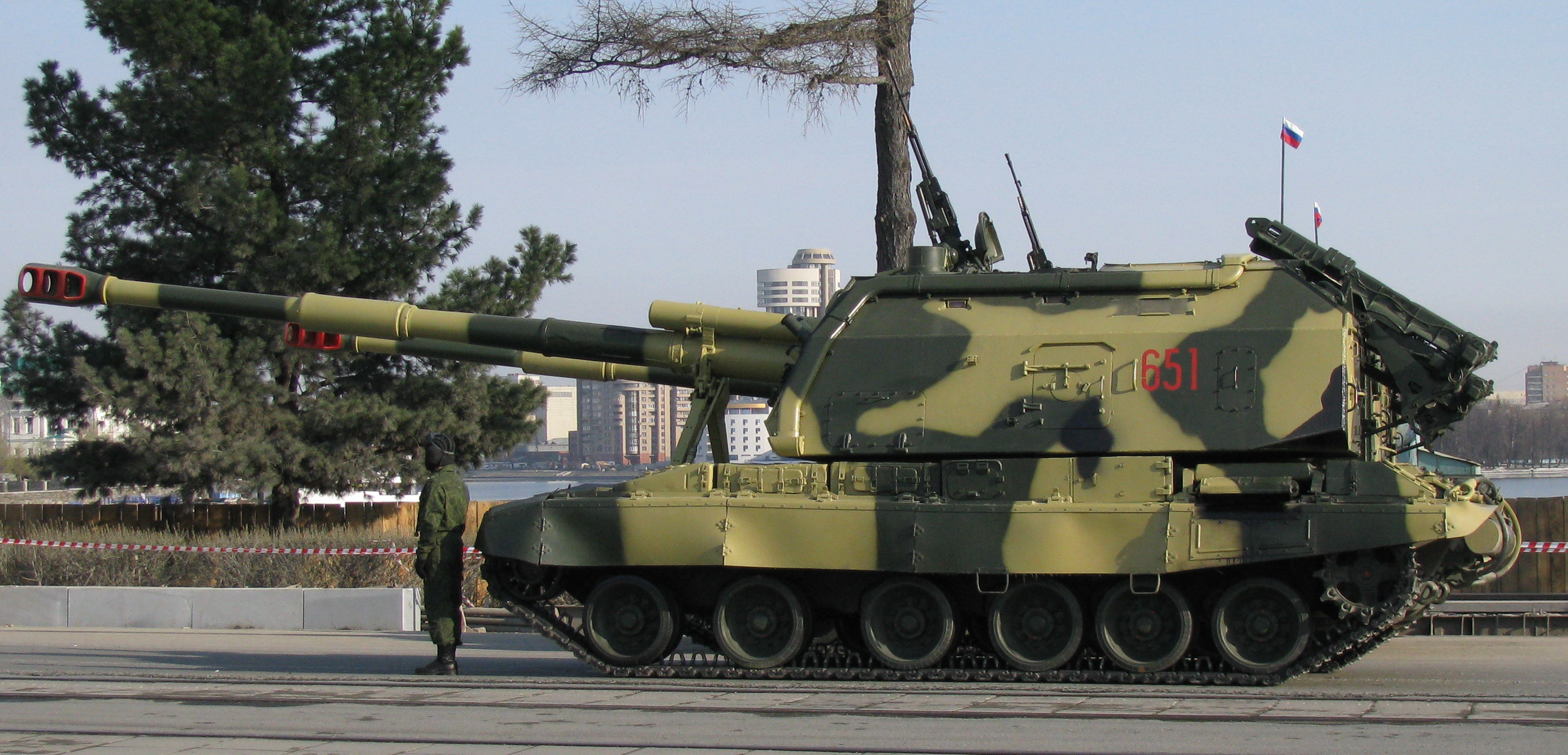 МСТА-С